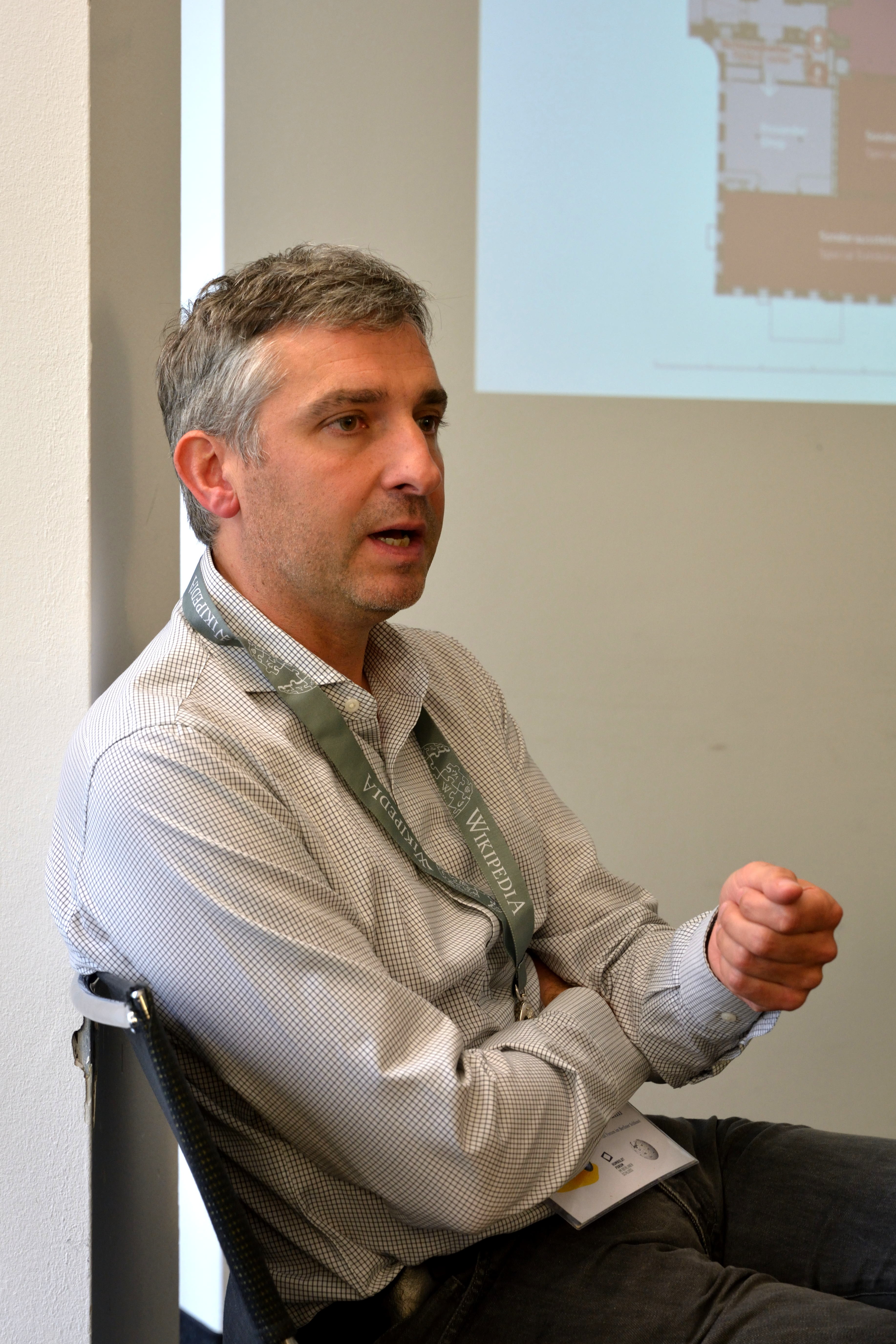 Alfred Hagemann im Gespräch mit Wikipedianern im November 2018